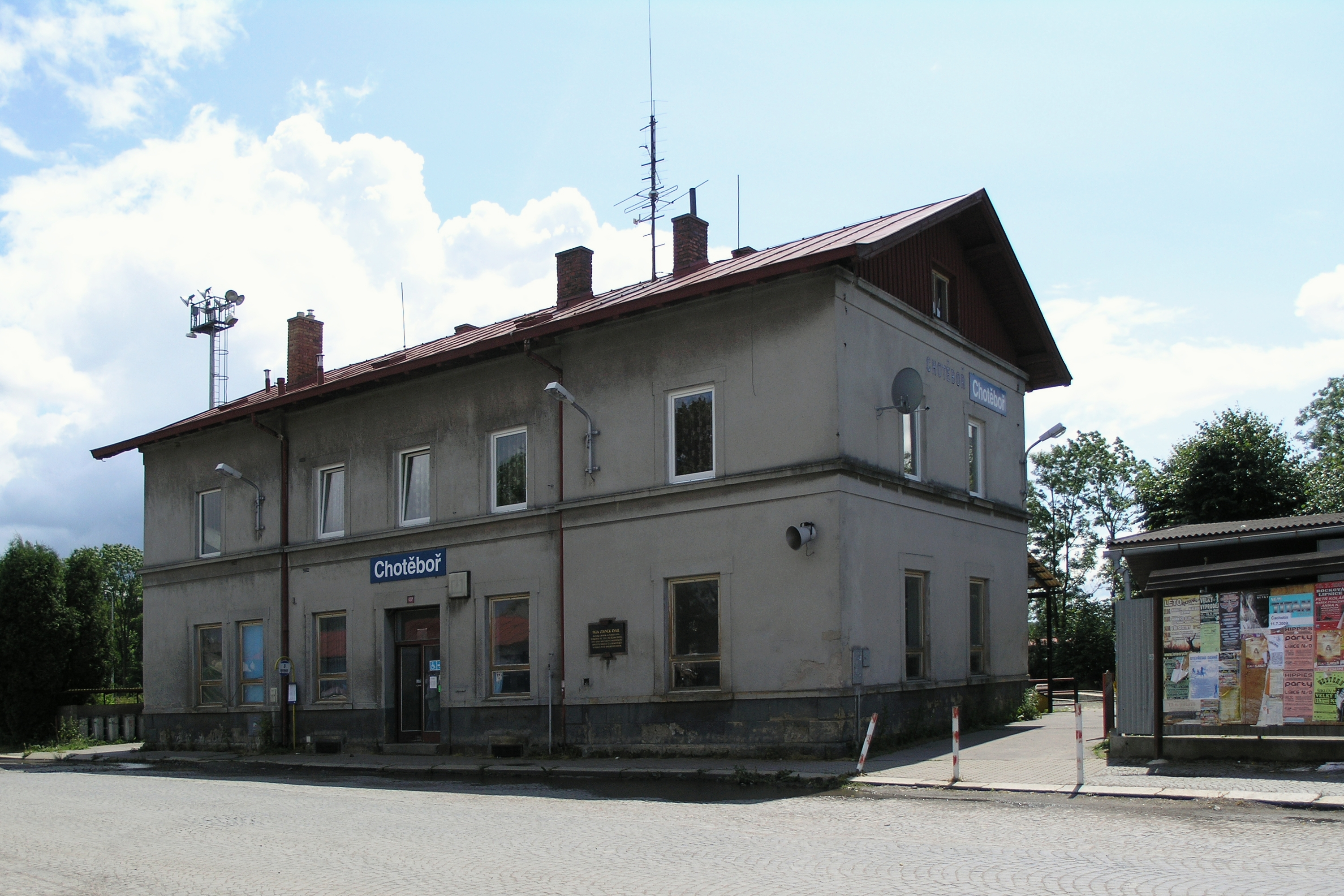 Chotěboř - vlakové nádraží